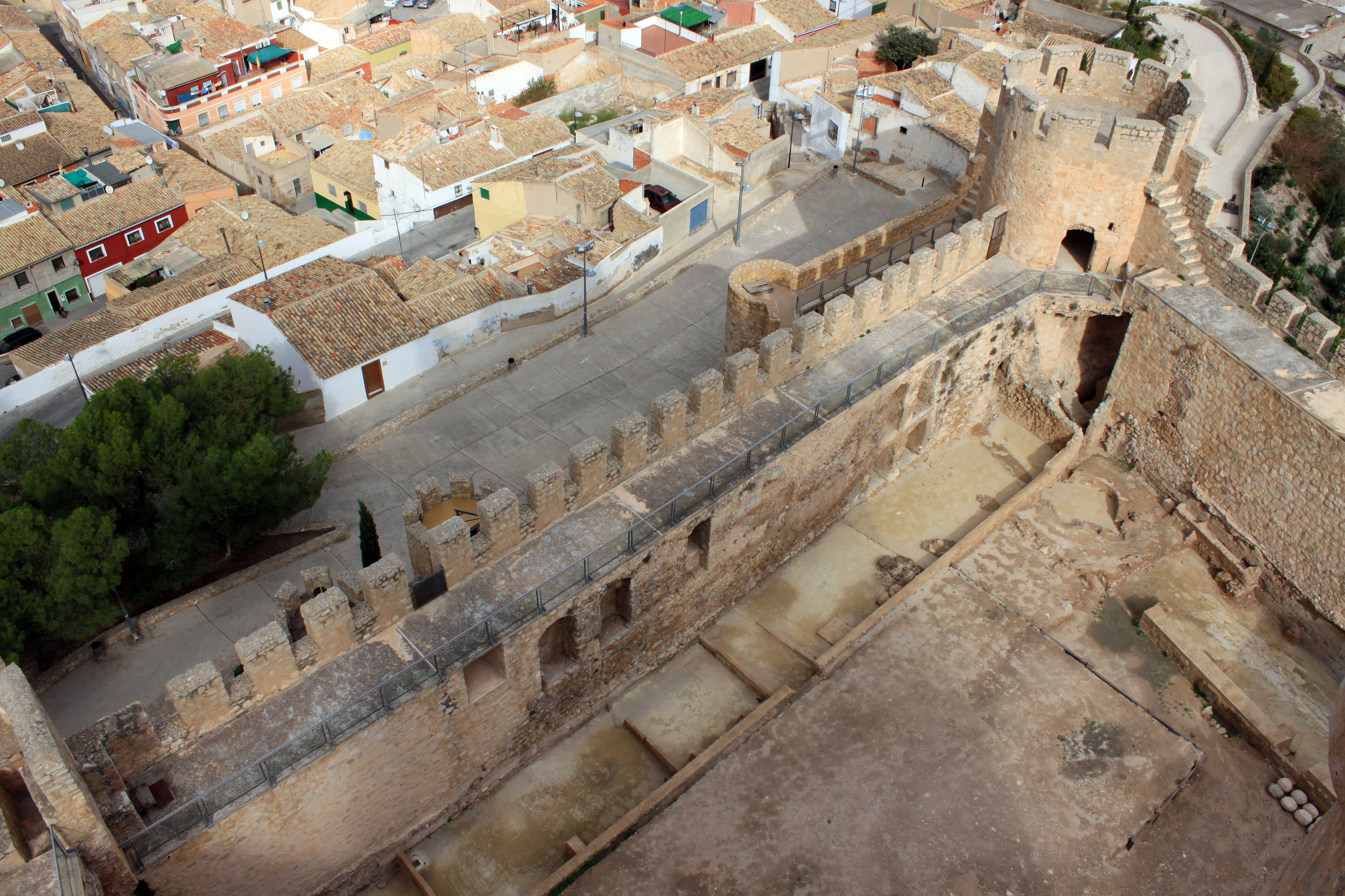 Castillo de la Atalaya Vista de la esquina nororiental del patio de armas desde el terrado de la torre del homenaje. Villena, provincia de Alicante, Comunidad Valenciana, España.